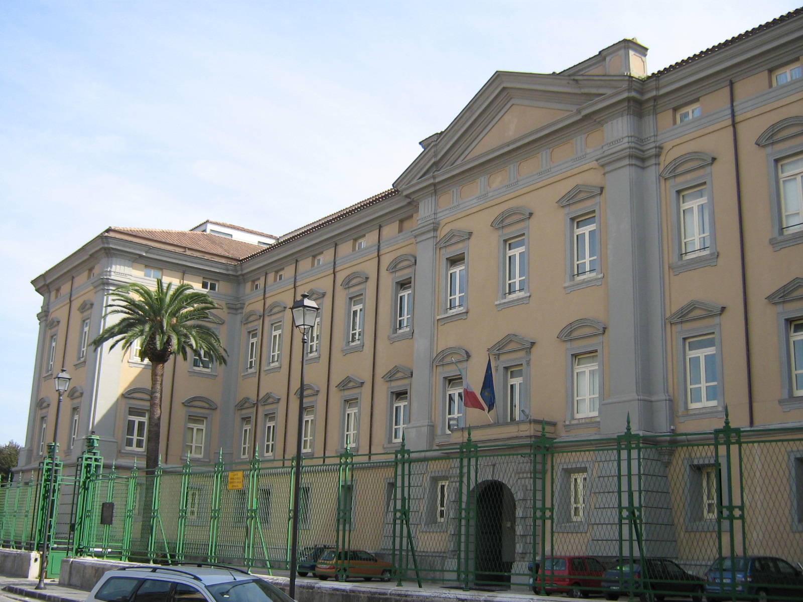 Castello Aragonese della città di Aversa